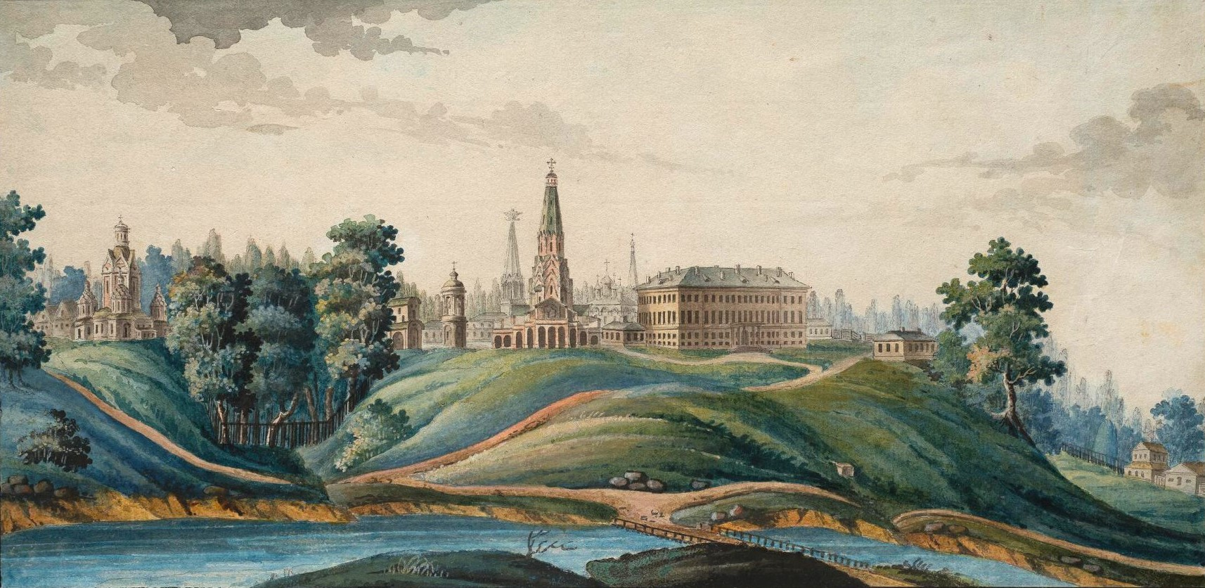 Дворец в Коломенском. Palace in Kolomenskoe. 18th century picture.